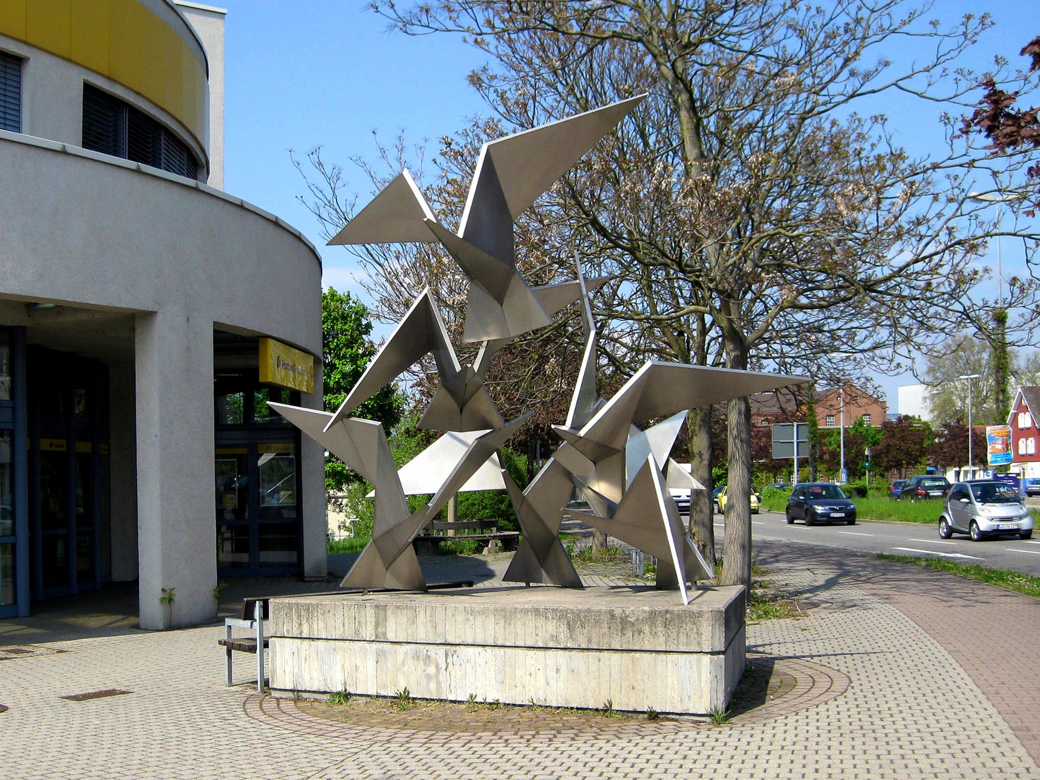 Fritz Melis, Auffliegende Tauben, 1967, - Deutschland, Baden-Württemberg, Bietigheim-Bissingen